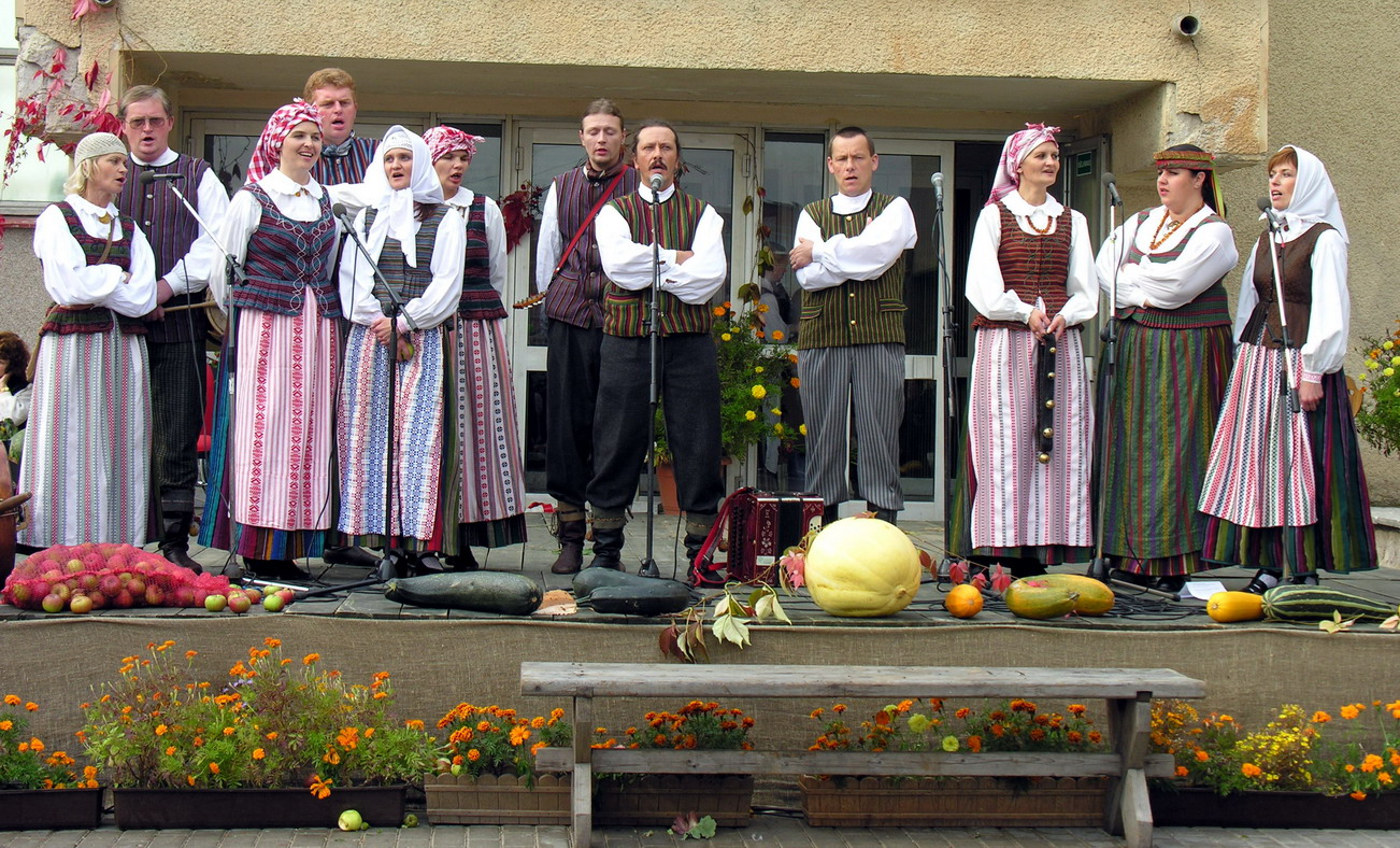 Žemaitėška: „Taduja", Kelmės jaunėma fuolkluora cėntra fuolkluora ansamblis Puortegrapėjė Algėrda, 2006 m. spalė 1 dėina, Žemaitėjė